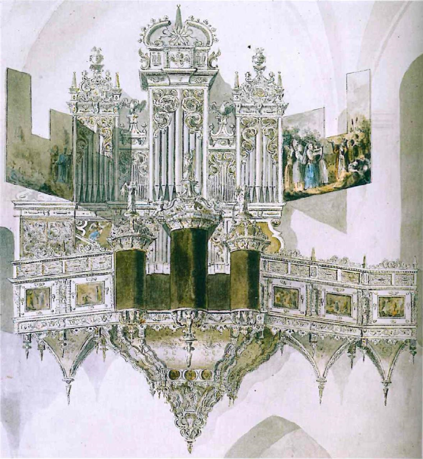 Aquarell der Lange-Orgel in St. Nikolai Leipzig, Sachsen, Deutschland